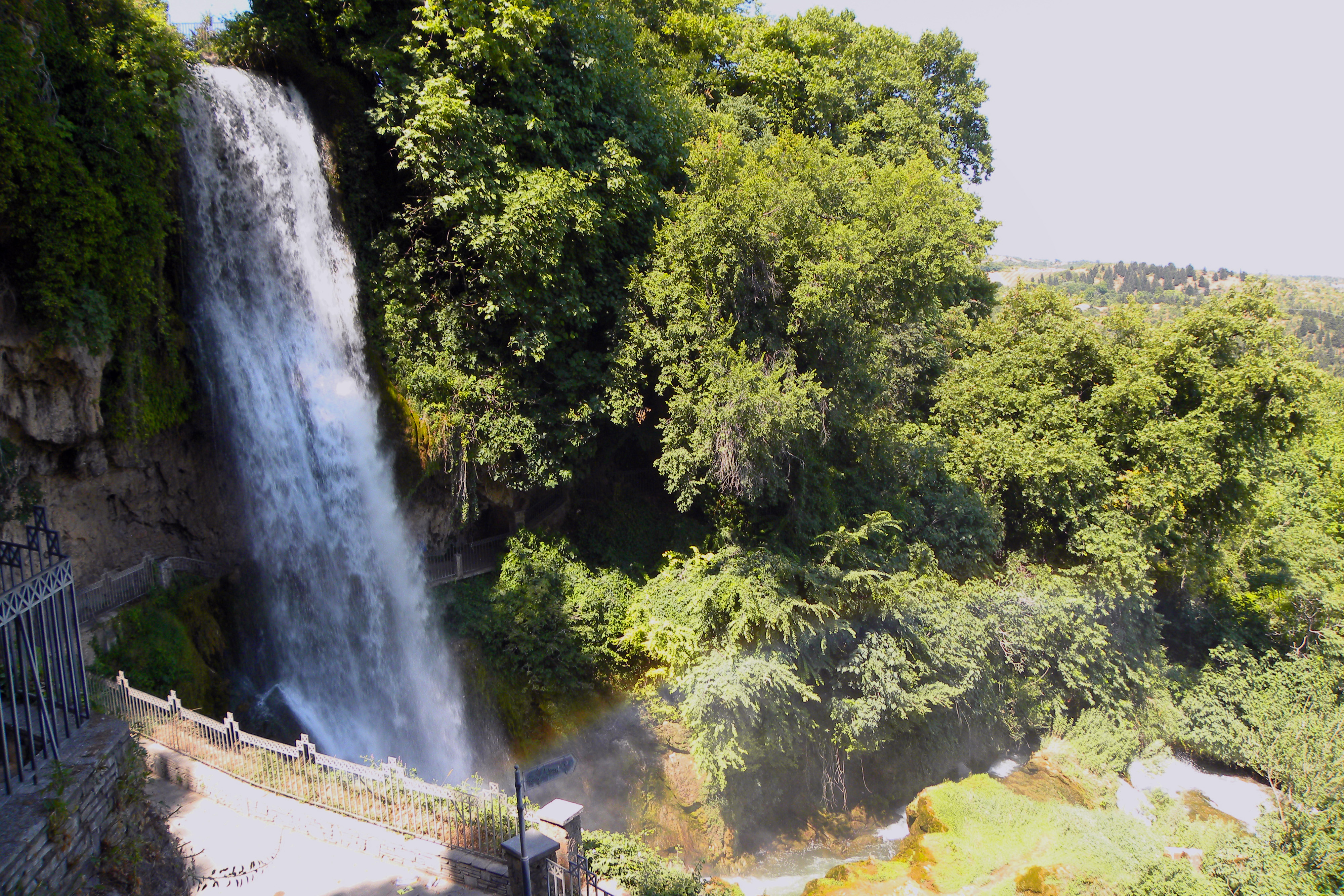 Έδεσσα